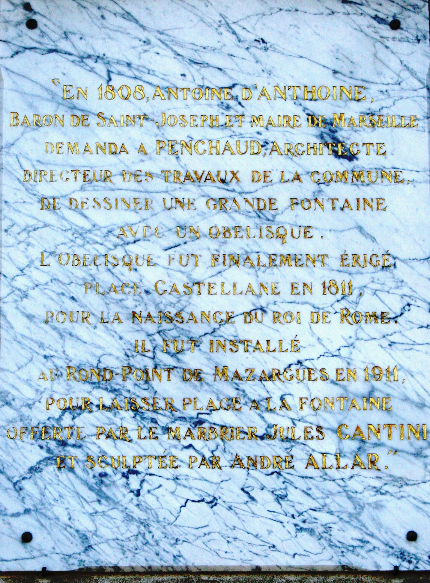 Plaque commémorative de l'obélisque de Mazagues qui était primitivement à la place Castellane à Marseille.